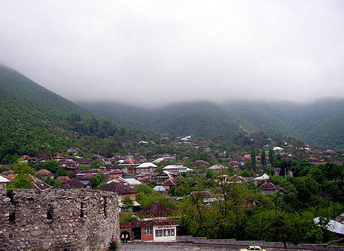 Sheki.jpg